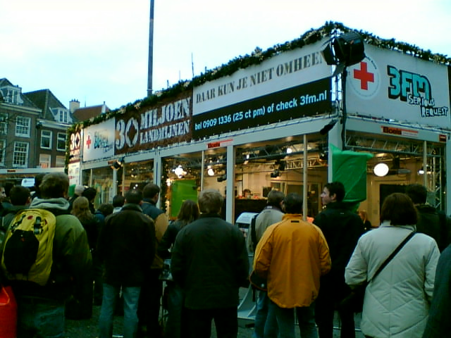 Foto van het Glazen Huis, Serious Request actie van 3fm